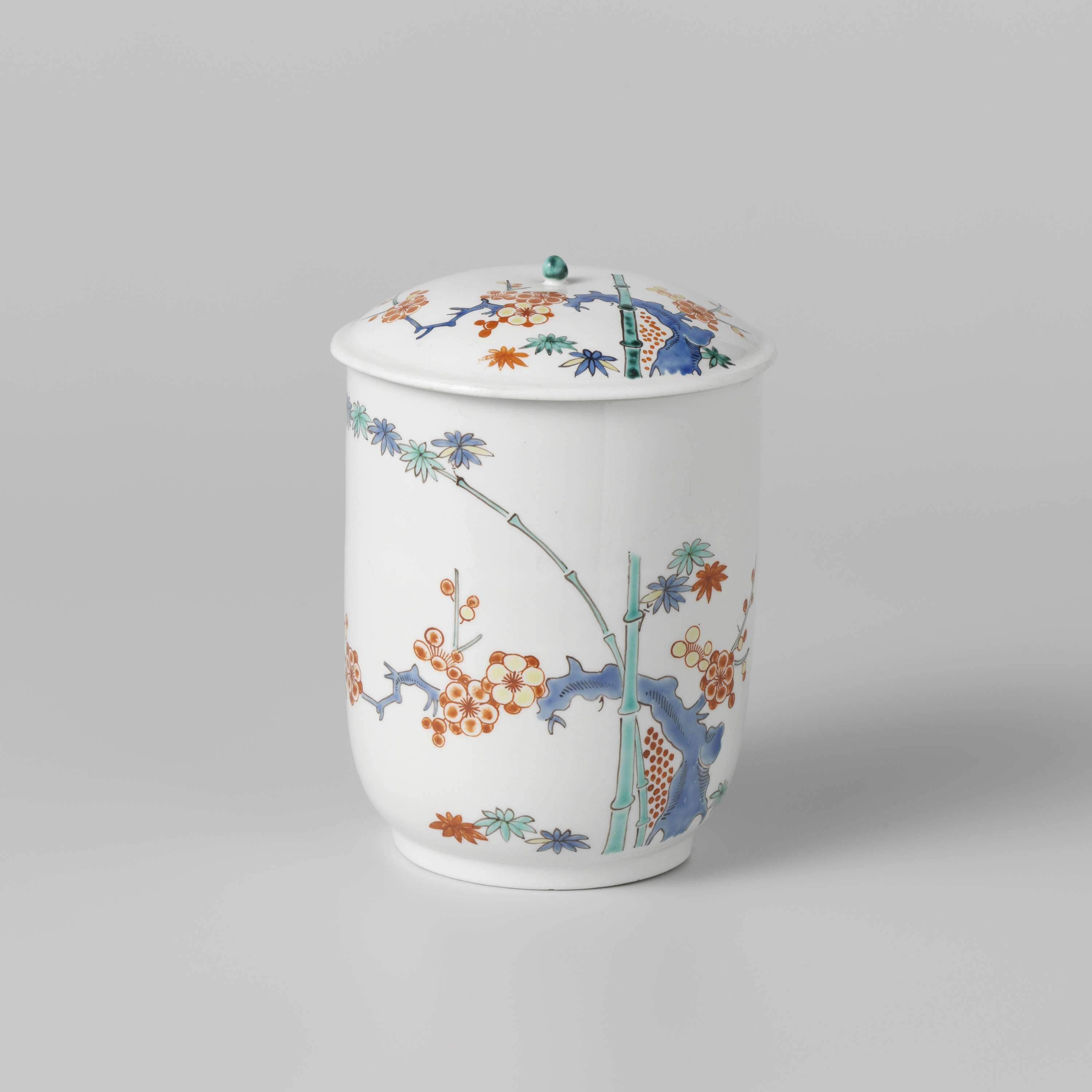 Deksel van porselein, beschilderd in blauw, rood, groen, geel en zwart met bamboe en prunus en twee vogels.. Kakiemon-decor. Met bijbehorende pot (A); vaatwerk; deksel